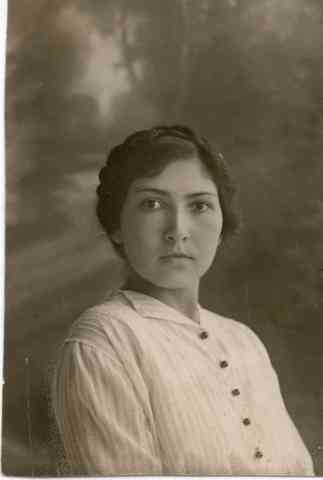 צפורה בבחרותה Tzippora Sharett צפורה שרת חיפה 07 צפורה 7